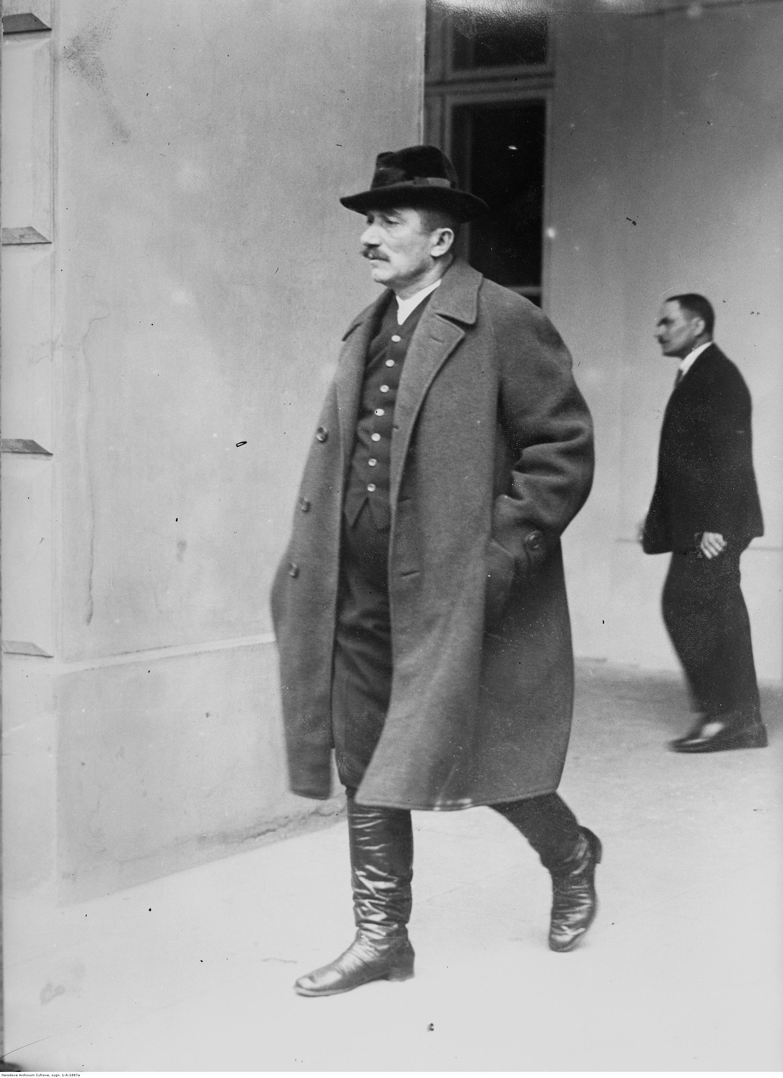 Wincenty Witos, poseł. Fotografia sytuacyjna.